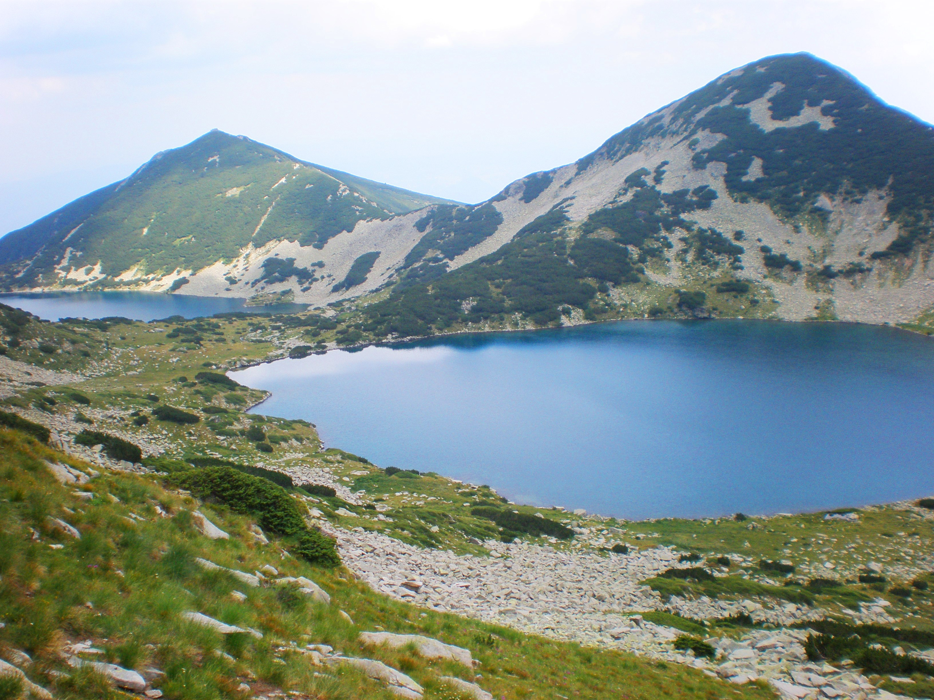 Пирин, Пирин